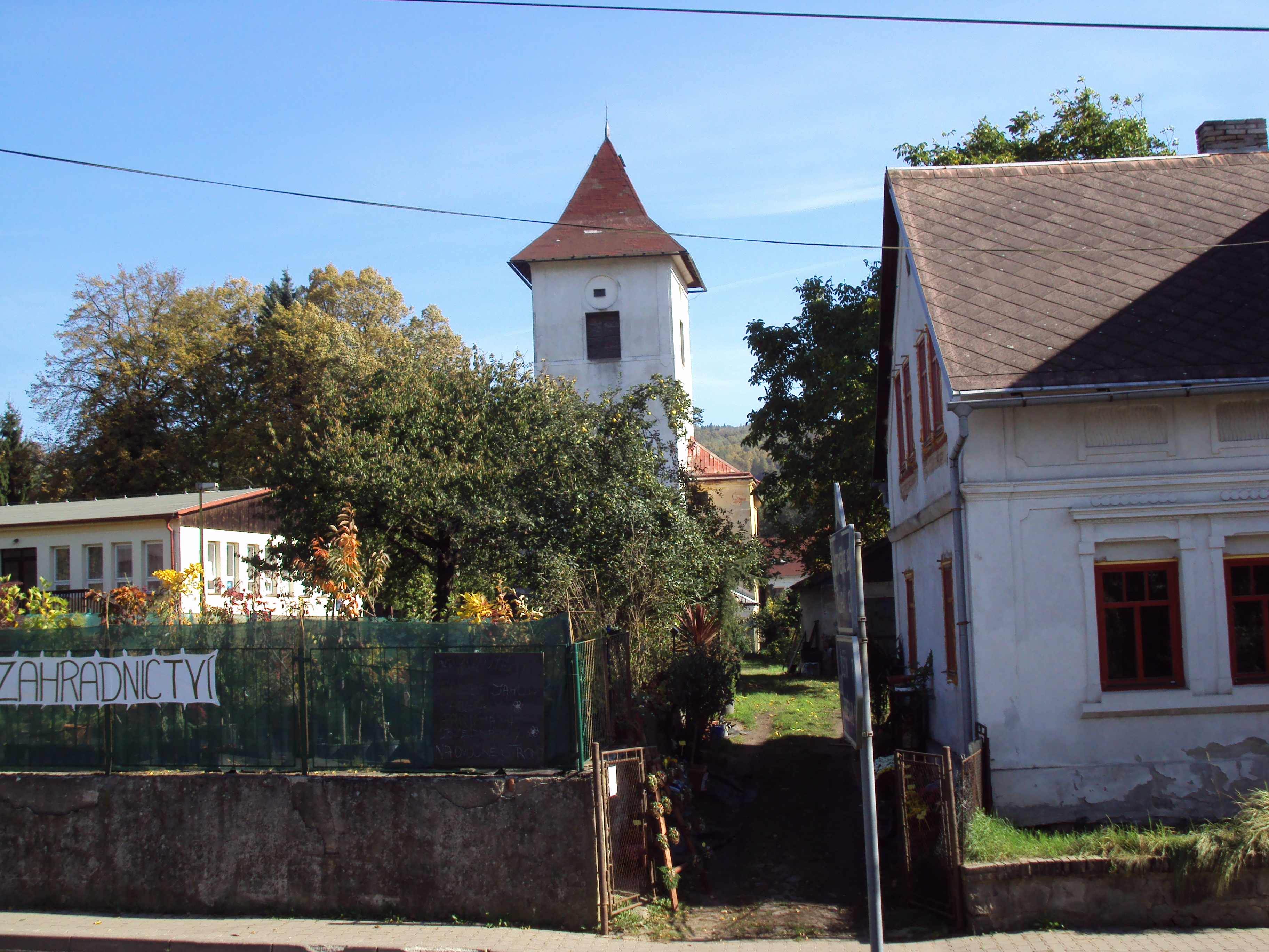 Kostel, vlevo mateřská školka v Žandově